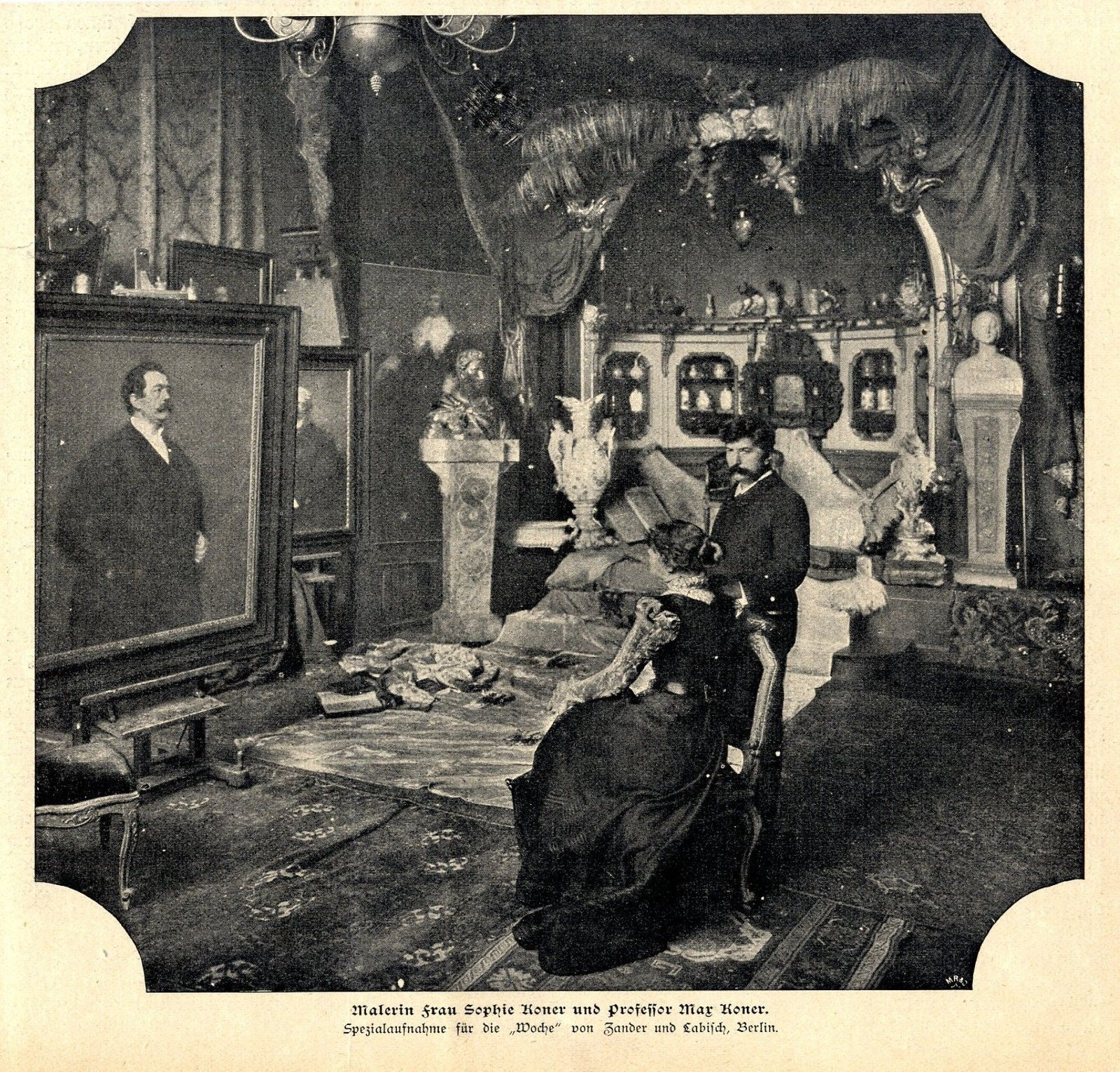 Malerin Frau Sophie Koner und Professor Max Koner im Atelier, 1899. Spezialaufnahme für die "Woche" von Zander & Labisch. (Links im Bild Koners Porträt Fürst Herbert von Bismarck von 1898)